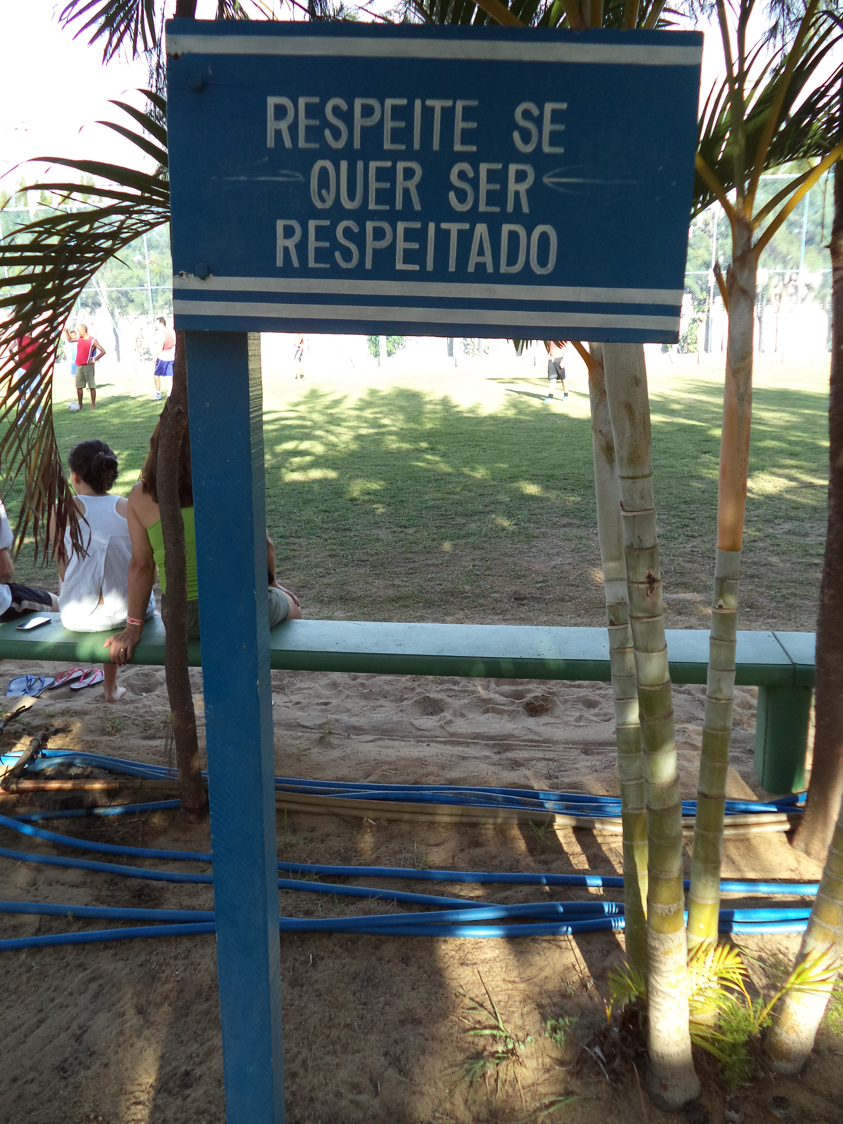 Placa sobre respeito em Grussaí, no município de São João da Barra, Brasil.